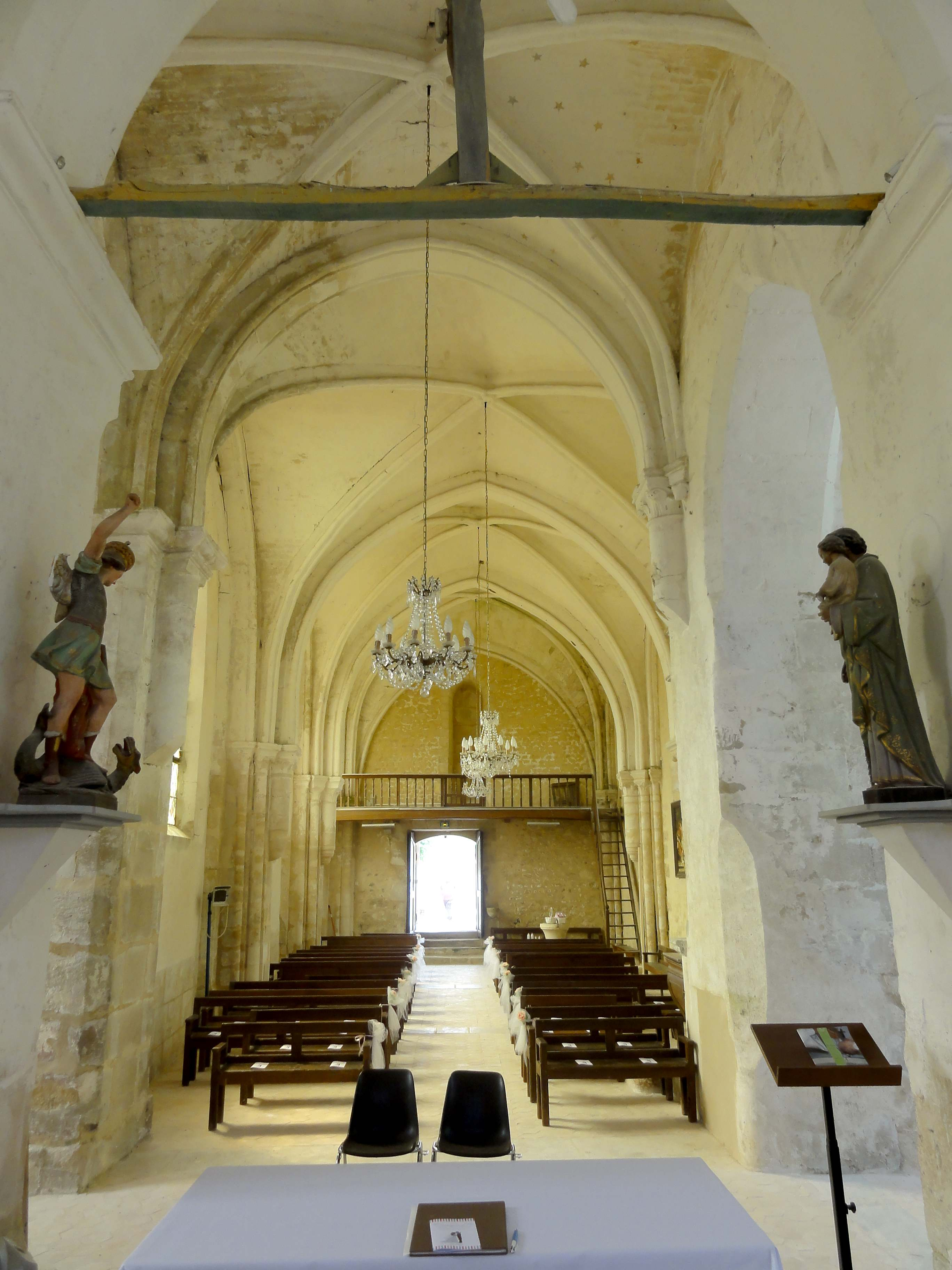 Intérieur de l'église (voir titre).